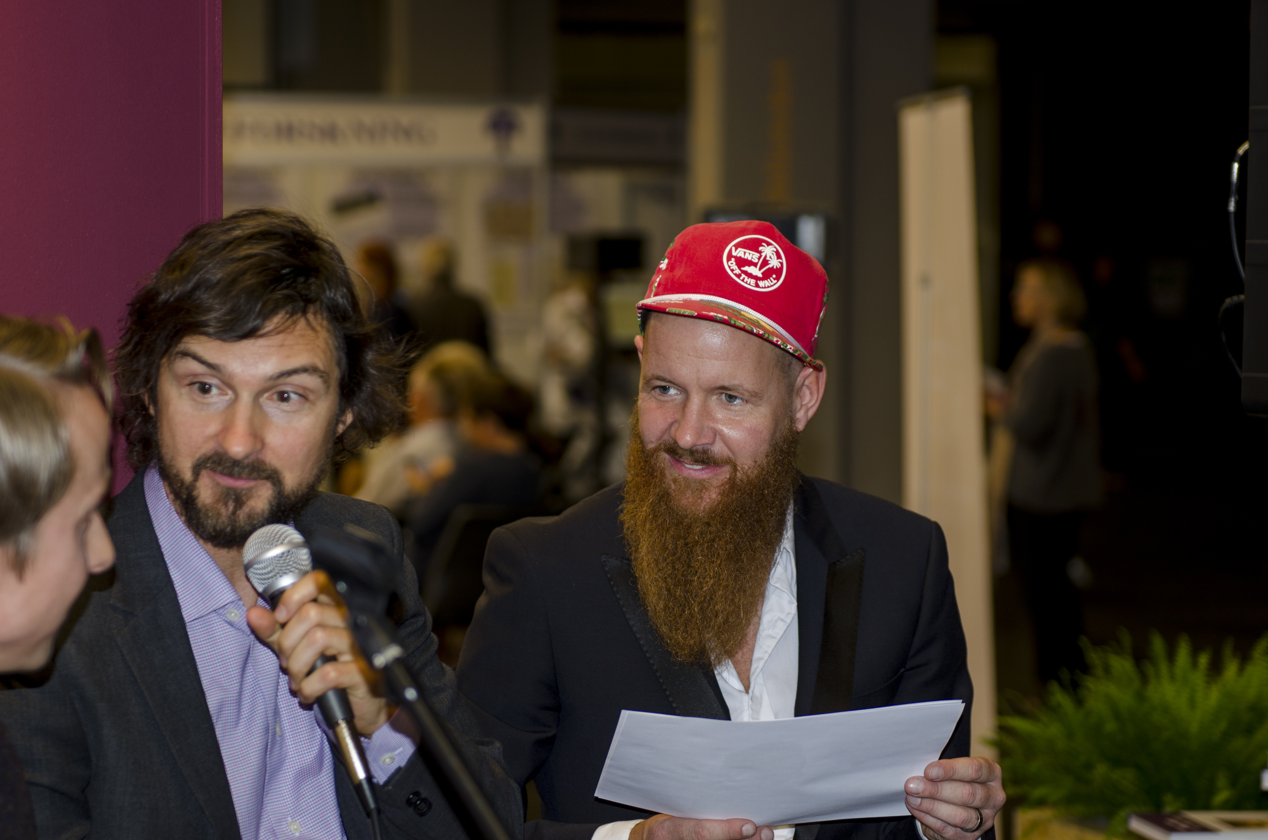 Christer Lundberg på Bokmässan i Göteborg 2014. Till vänster i bild syns även Morgan Larsson.